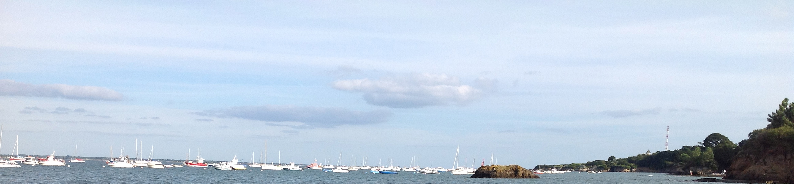 Mouillage